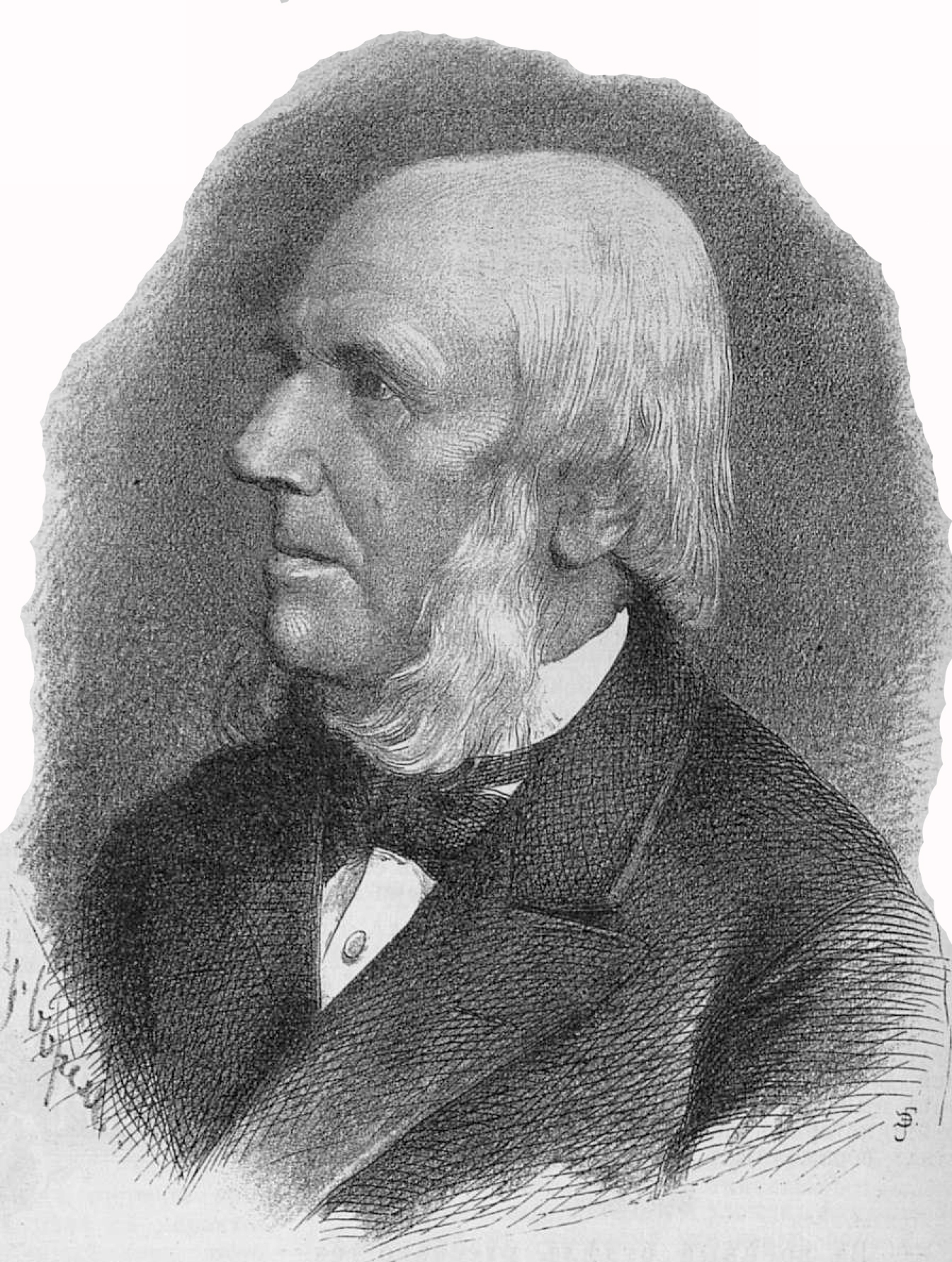 Старчевский Альберт Викентьевич, журналист